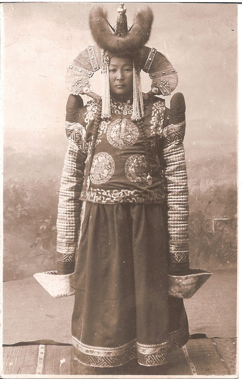 Монгольская аристократка начала XX века